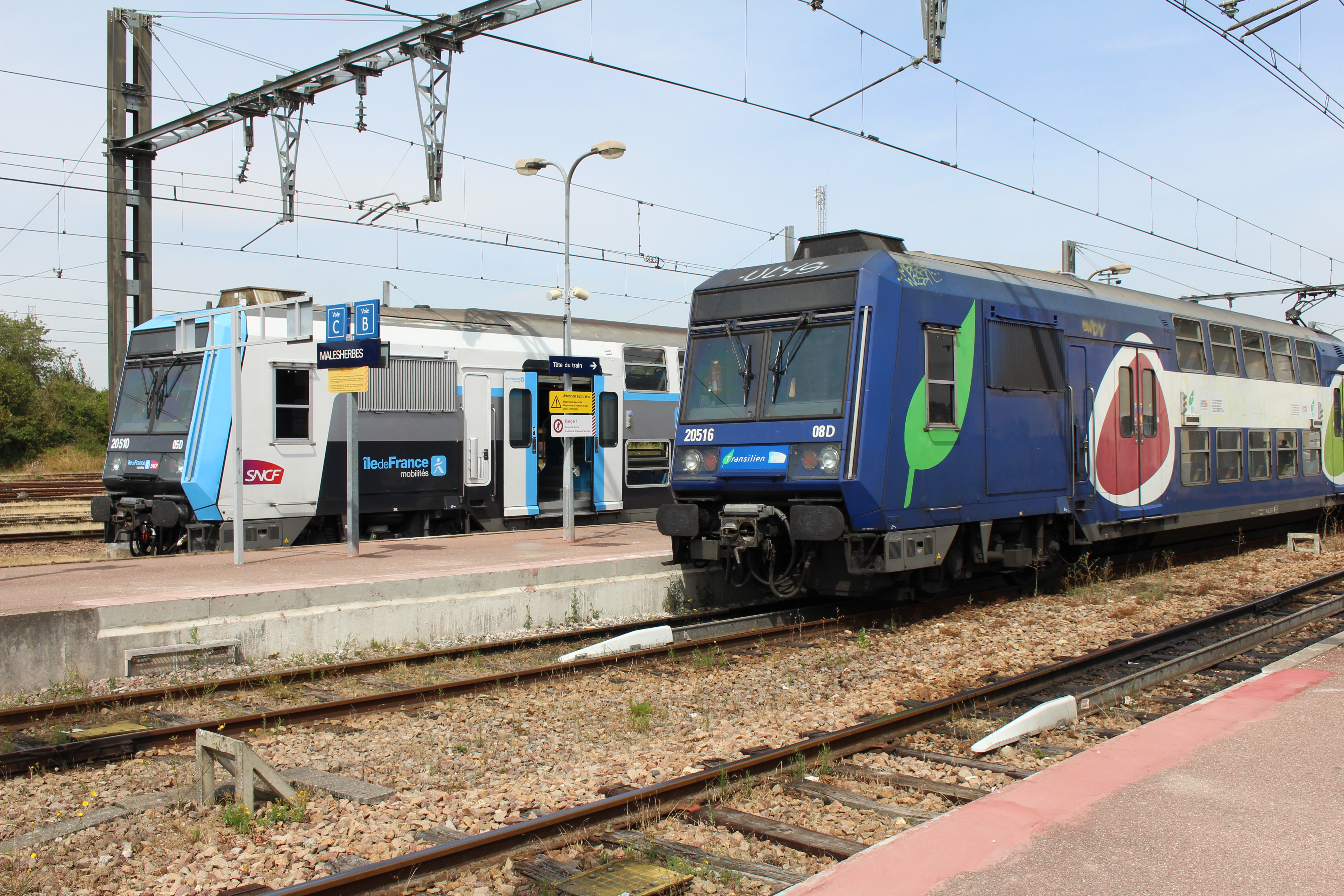 Gare de Malesherbes, Le Malesherbois.